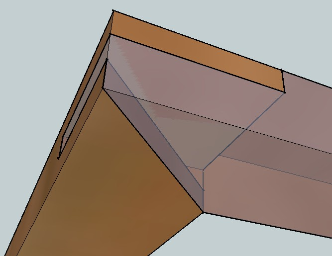 Sarokkötés ollós csappal, 45 fokos illesztés